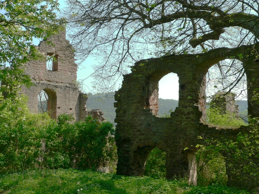 Collenburg oberhalb von Collenberg am Main, Germany - Reste des östlichen Palas